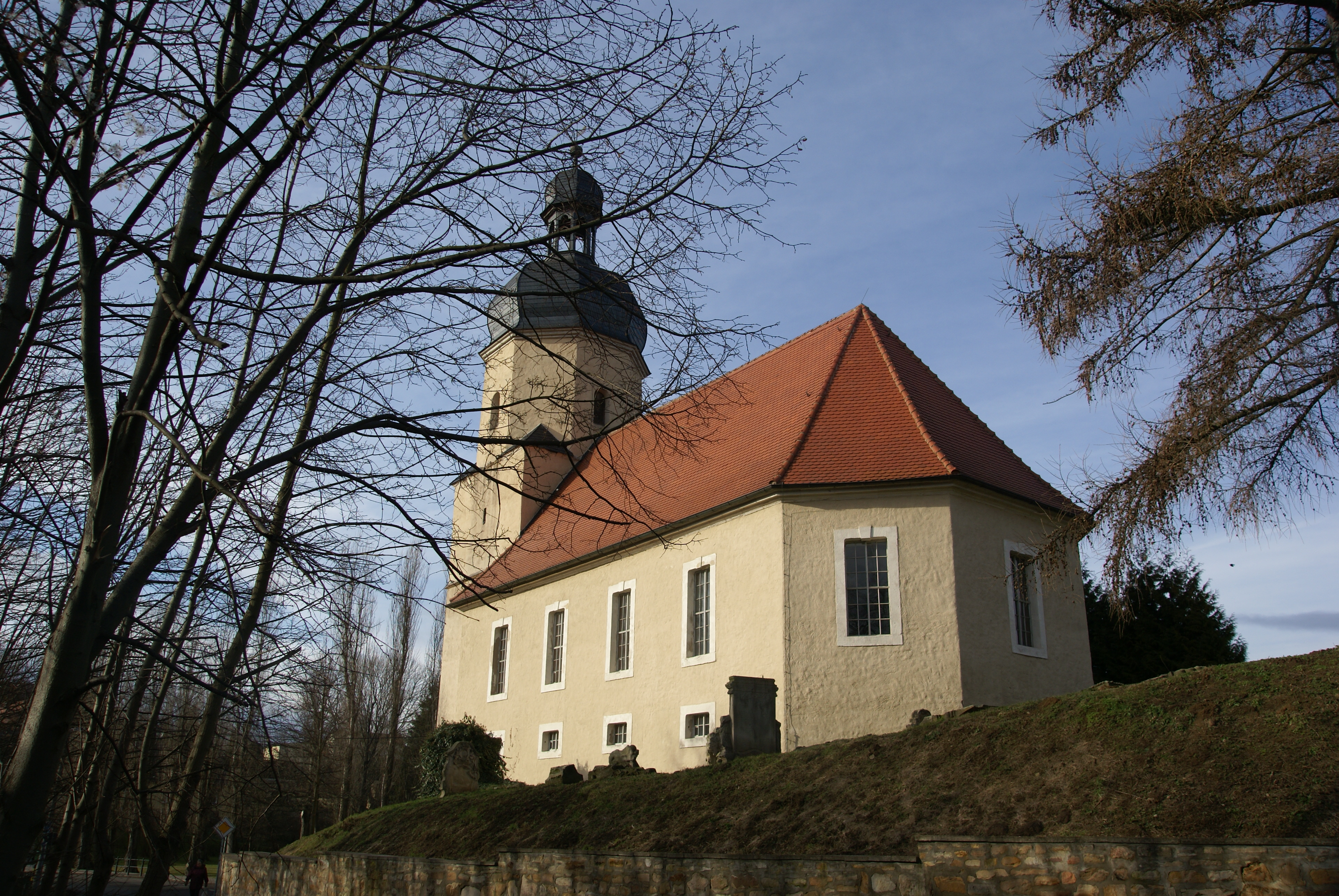 die Dorfkirche von Fienstedt